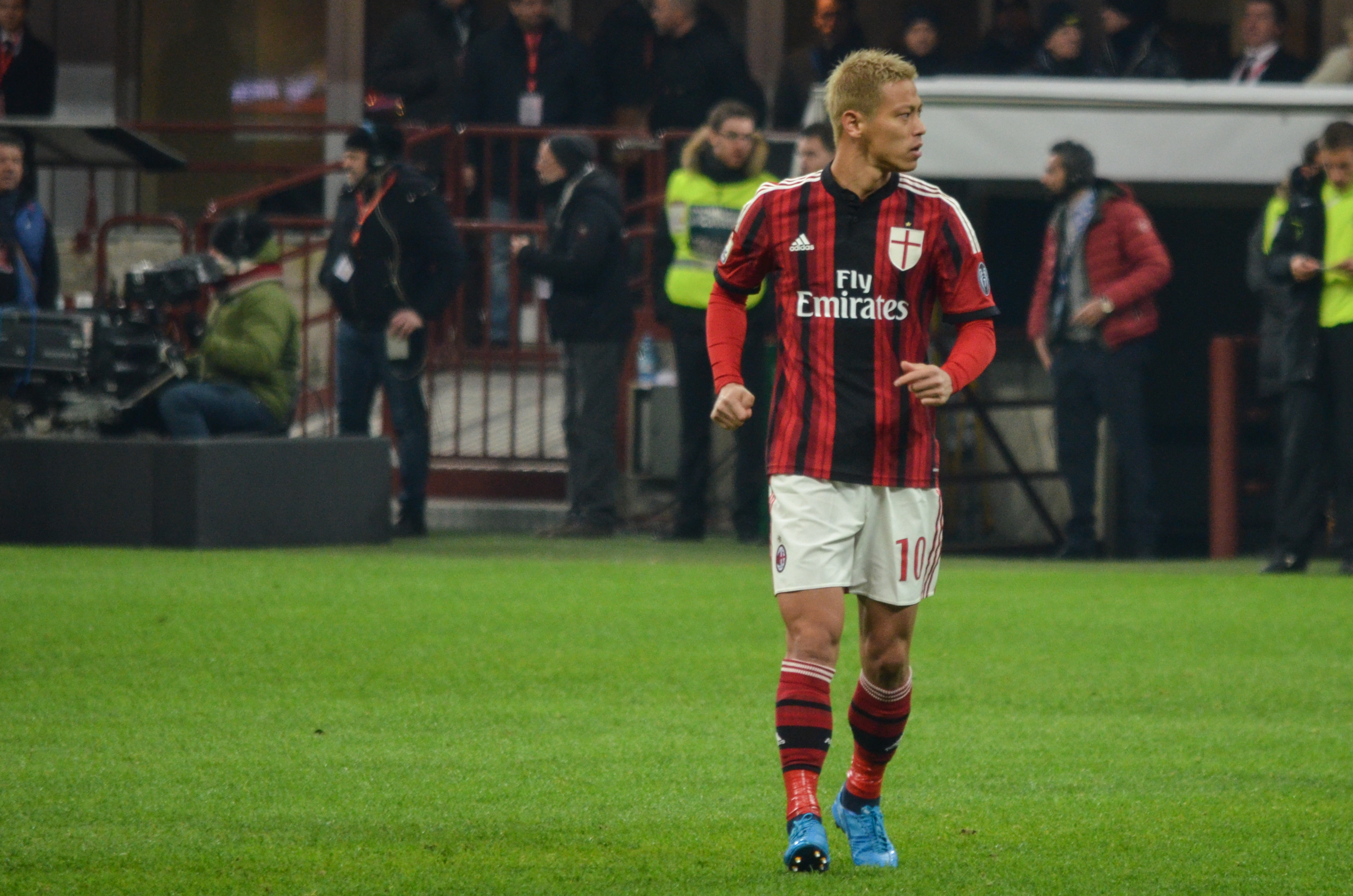 K. Honda durante Milan-Lazio di Coppa Italia 2015